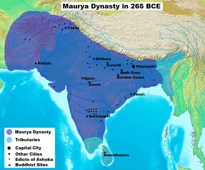 Maurya empire from factsninfo